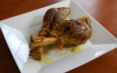 Lamb shanks